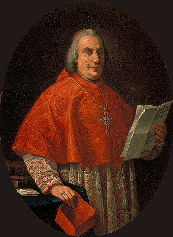 La paternità del ritratto e l'identificazione del personaggio raffiguratovi vengono svelati dall'iscrizione presente nella lettea tenuta in mano dal porporato. Il dipinto fu realizzato nel 1777 in occasione della nomina cardinalizia del Marcolini.